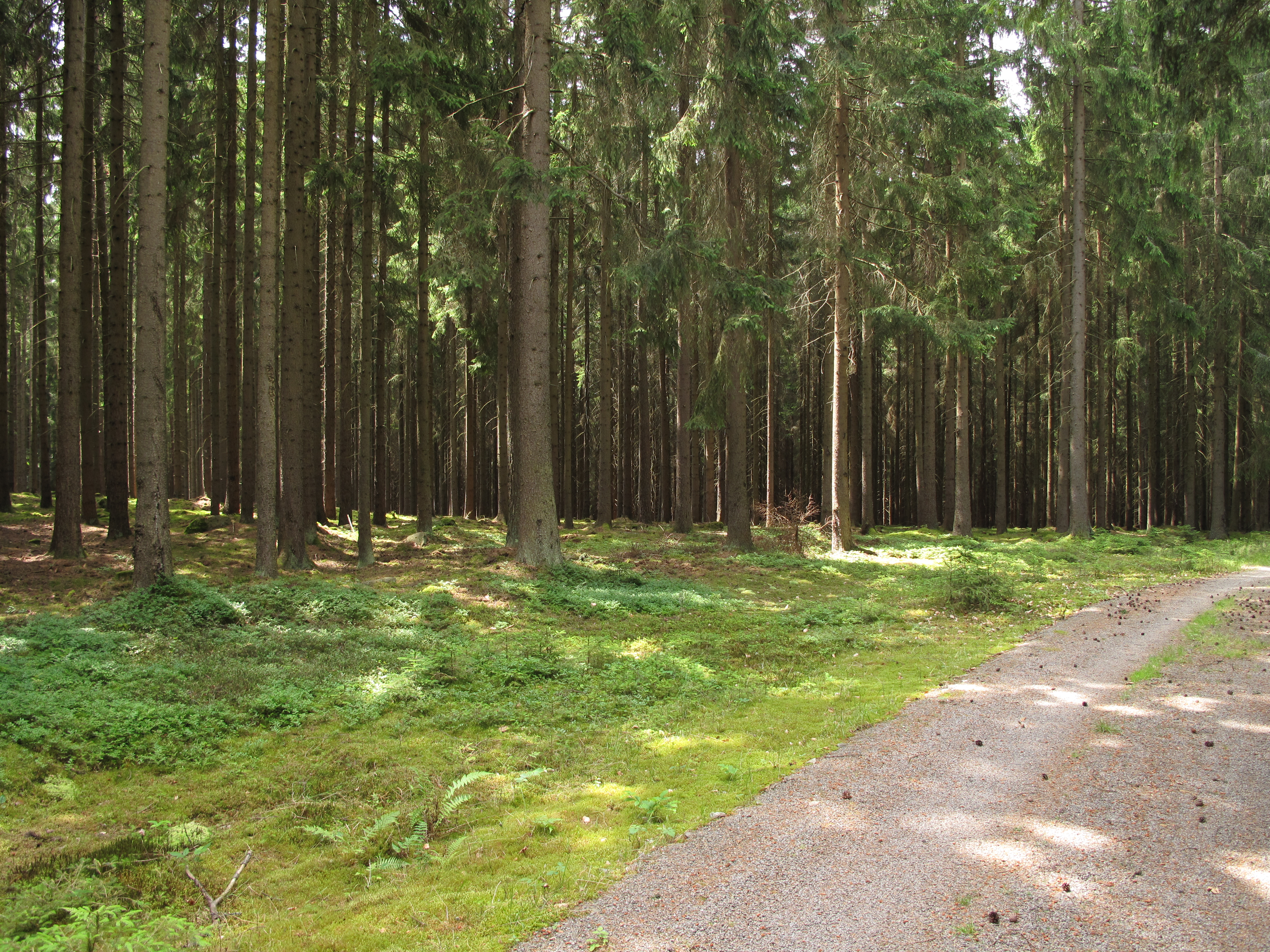 Přírodní park Čeřínek. Okres Pelhřimov, Česká republika.